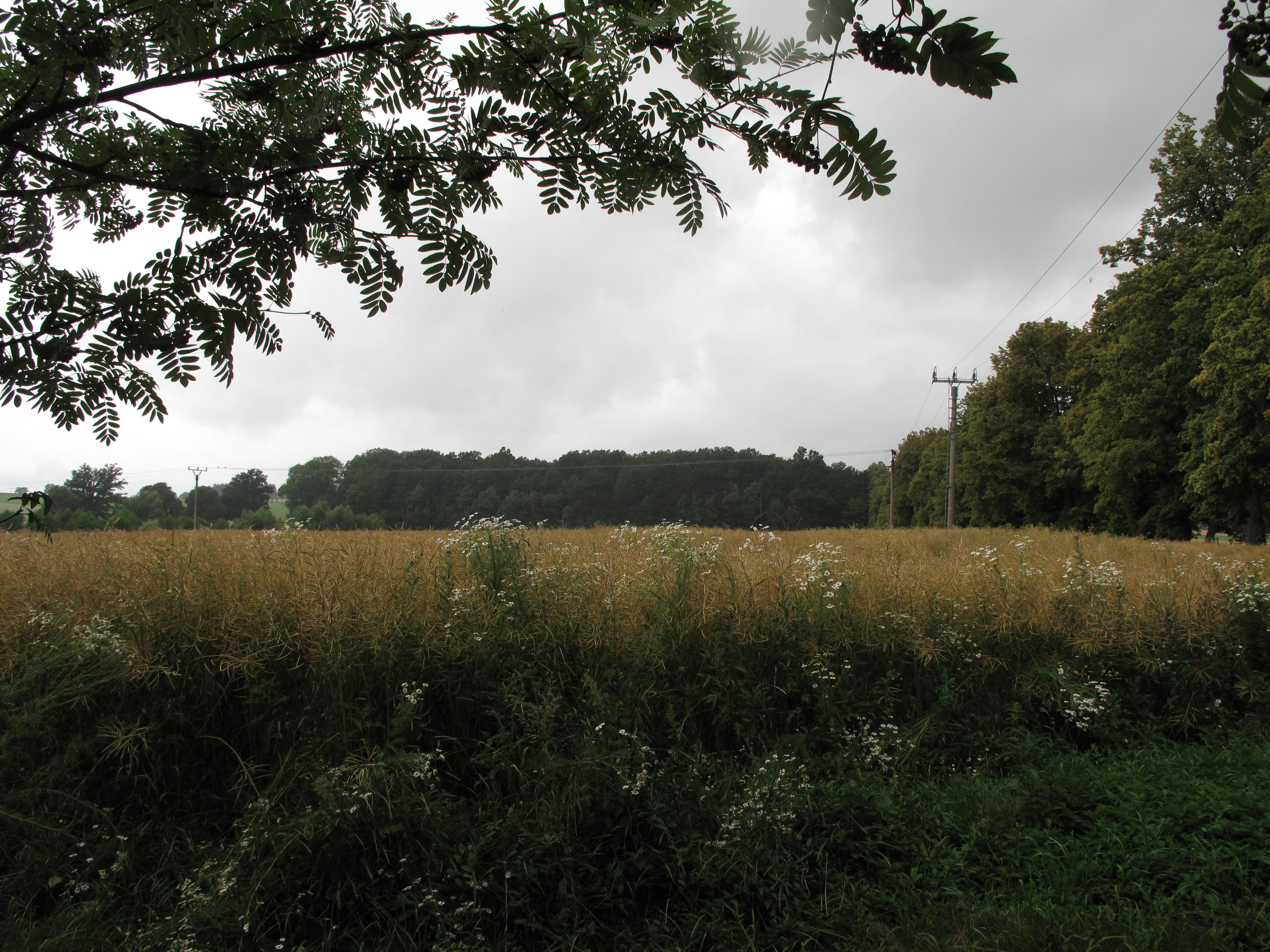 Přírodní rezervace Luh u Telče. Okres Jihlava, Česká republika.